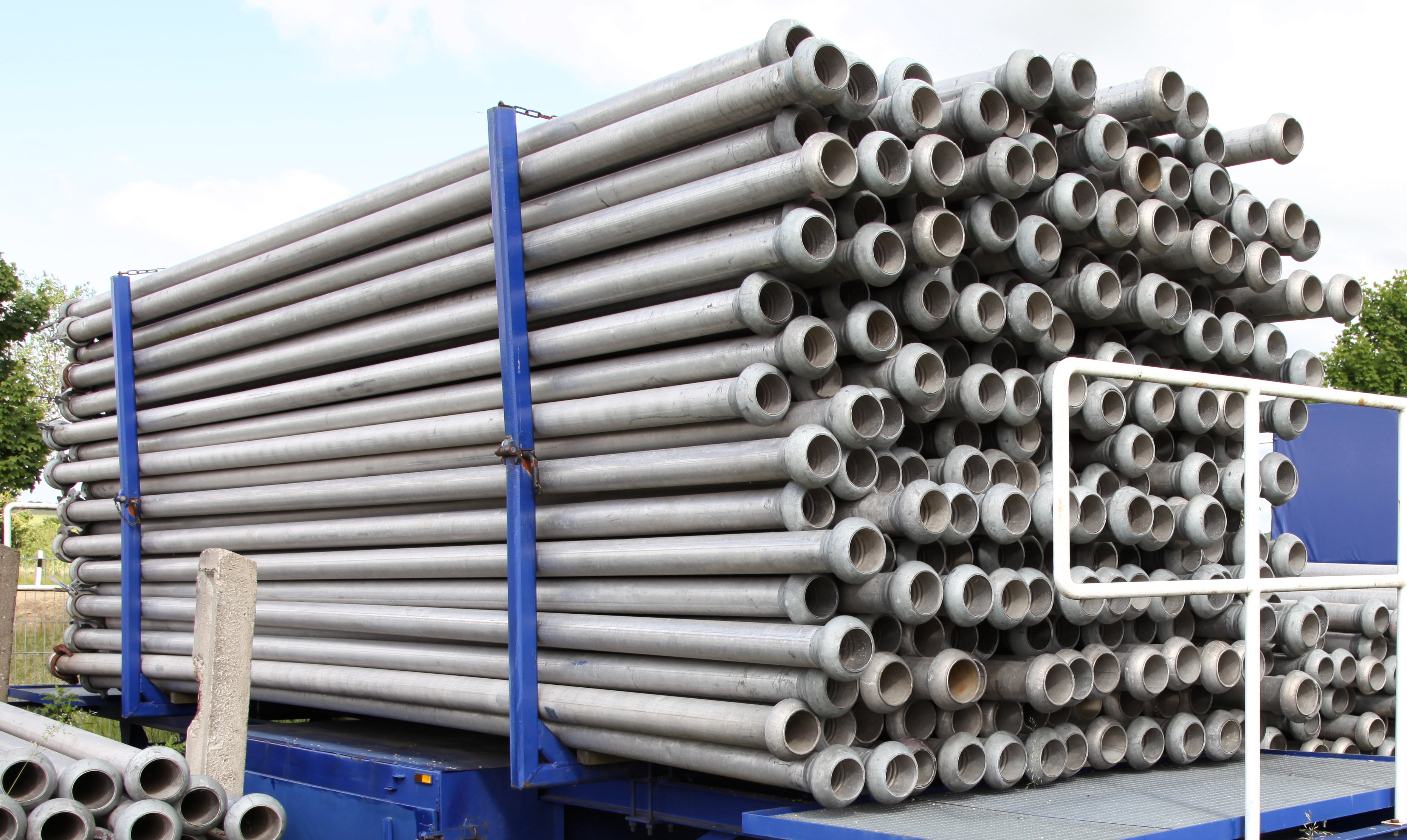 SK-Rohre/Lanninger-Rohre auf einem Anhänger, THW OV Neuruppin